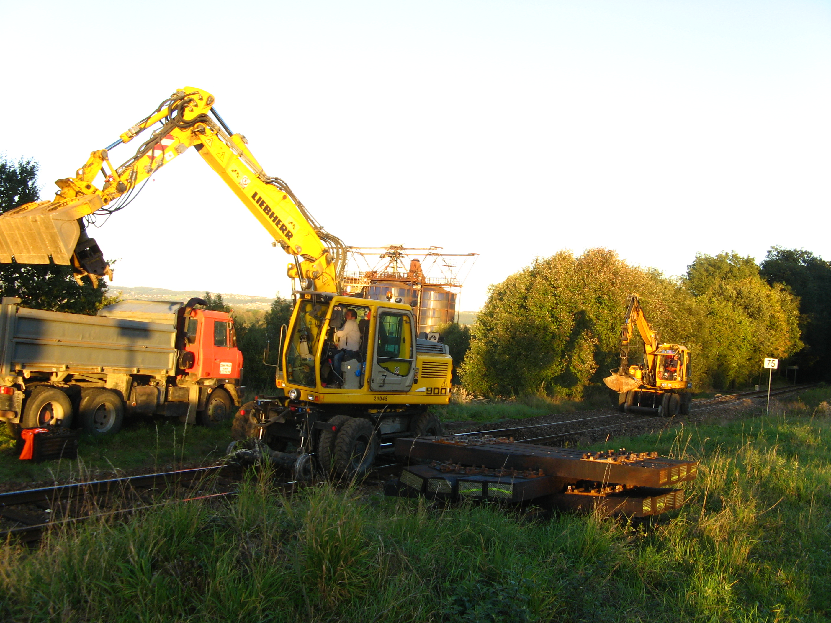 Výměna pražců v Černém Dubu na trati 194